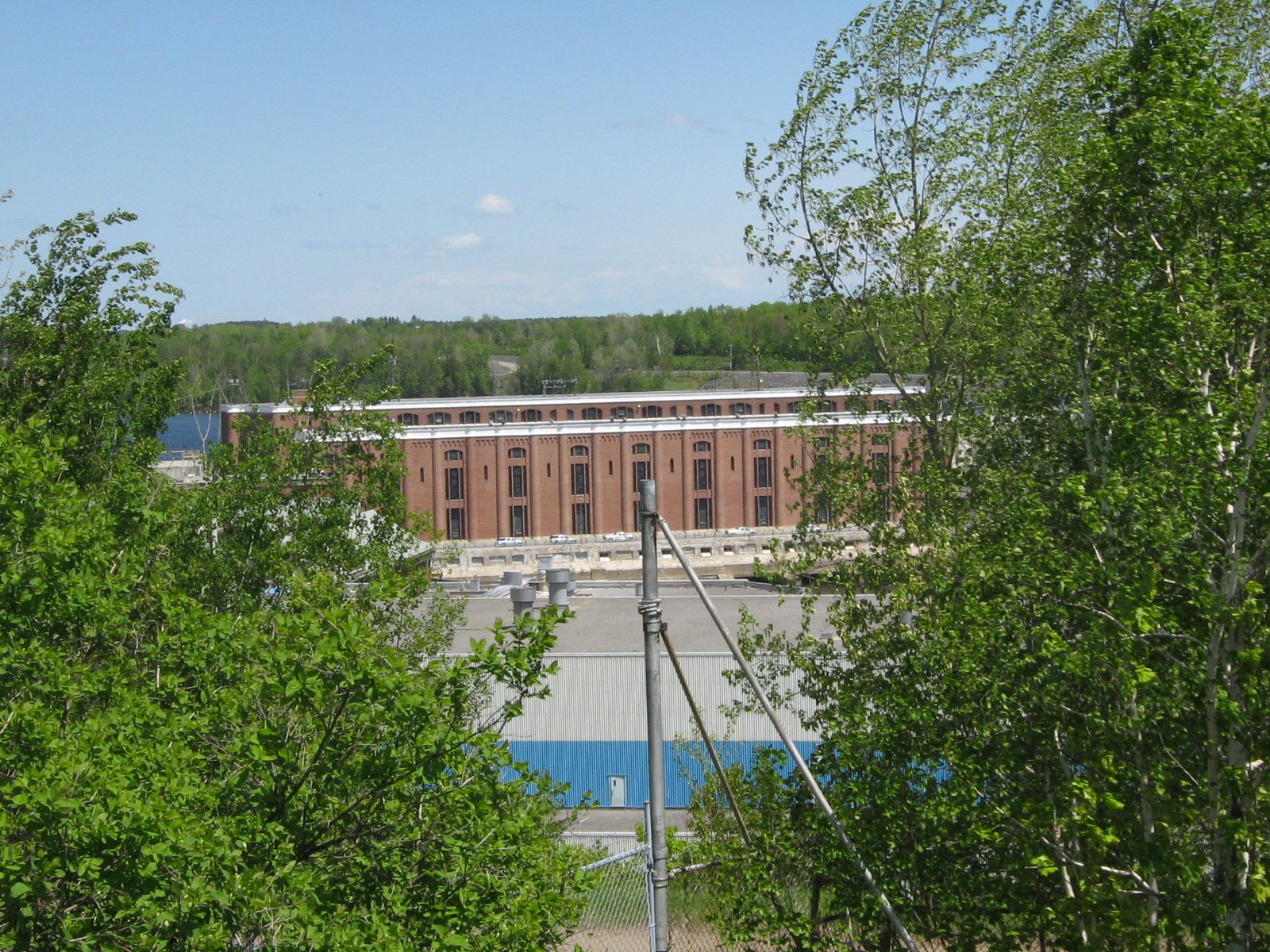 Centrale de Grand-Mère, sur la rivière Saint-Maurice à Shawinigan